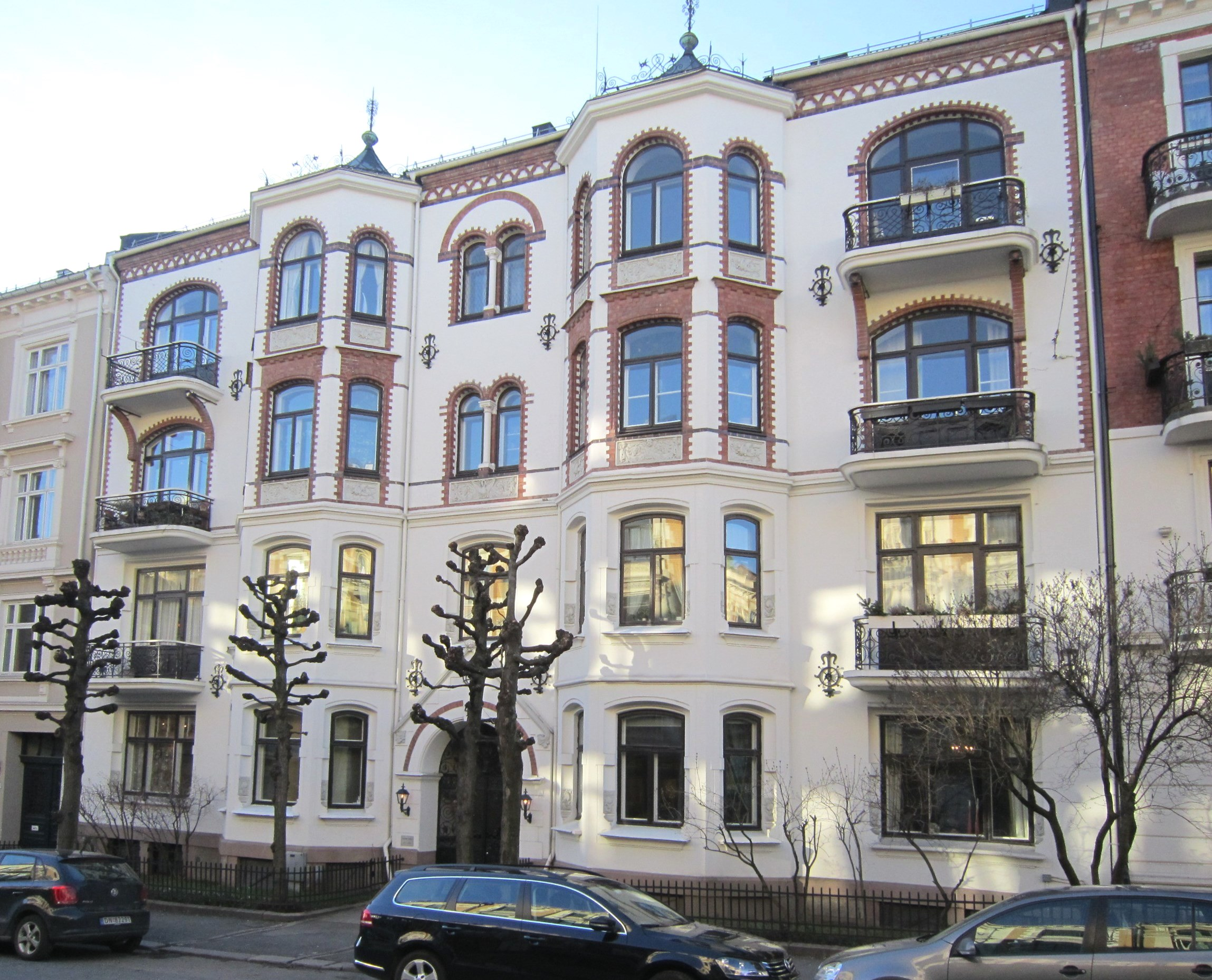 Niels Juels gate 42. Arkitekt: Heinrich Jürgensen.